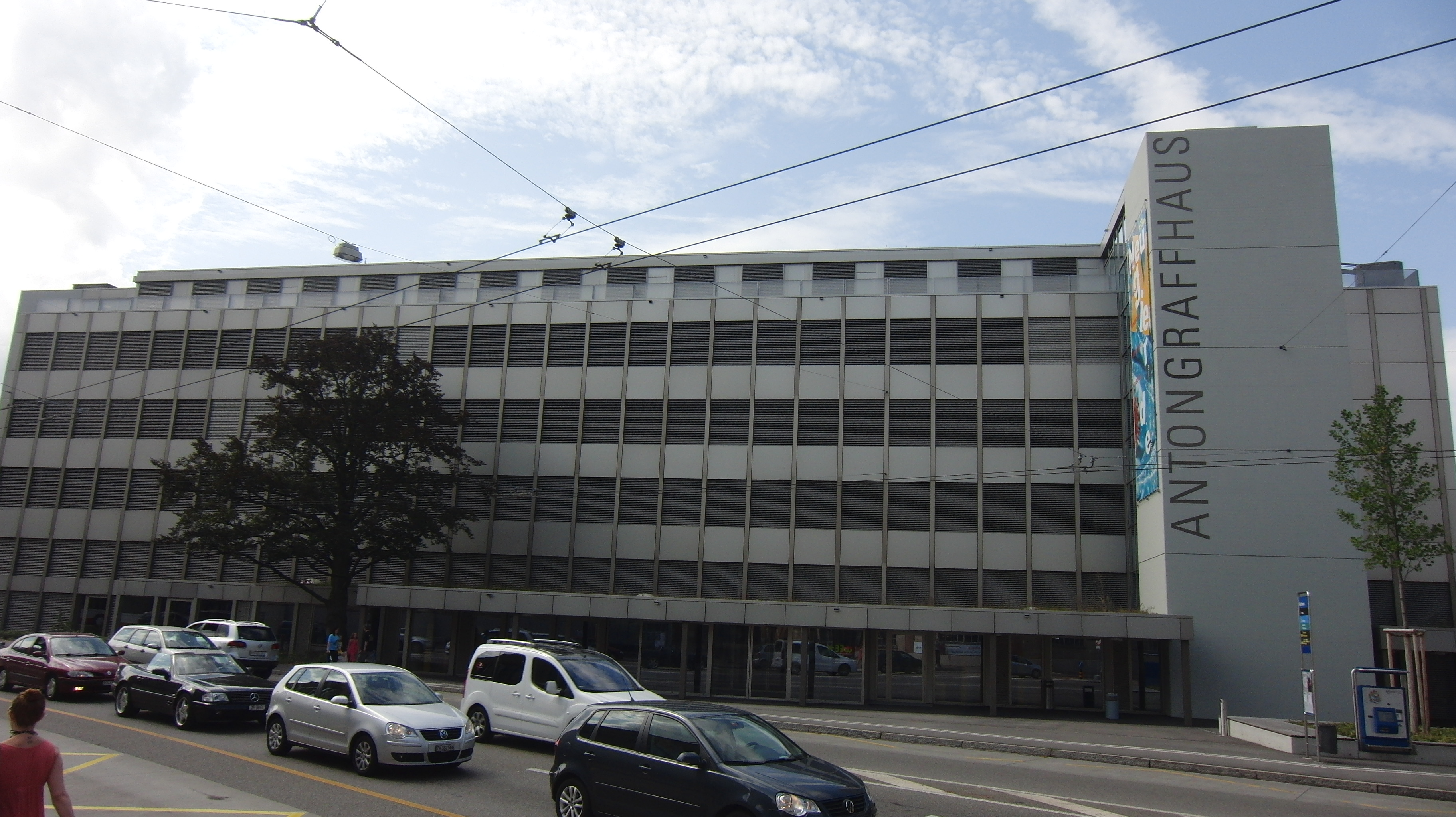 Anton-Graff-Haus in Winterthur. BMS-Schulhaus der BBW Winterthur